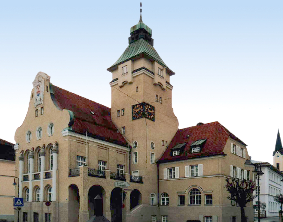 Simbach am Inn: Das Rathaus